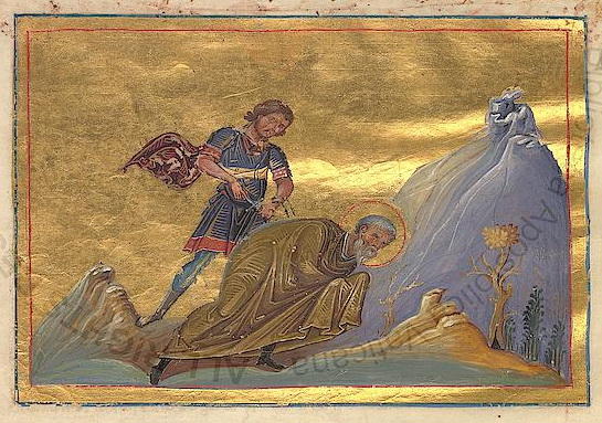 Священномученик Корнут, епископ Никомидийский (Иконийский) Константинополь. 985 г. Миниатюра Минология Василия II. Ватиканская библиотека. Рим.